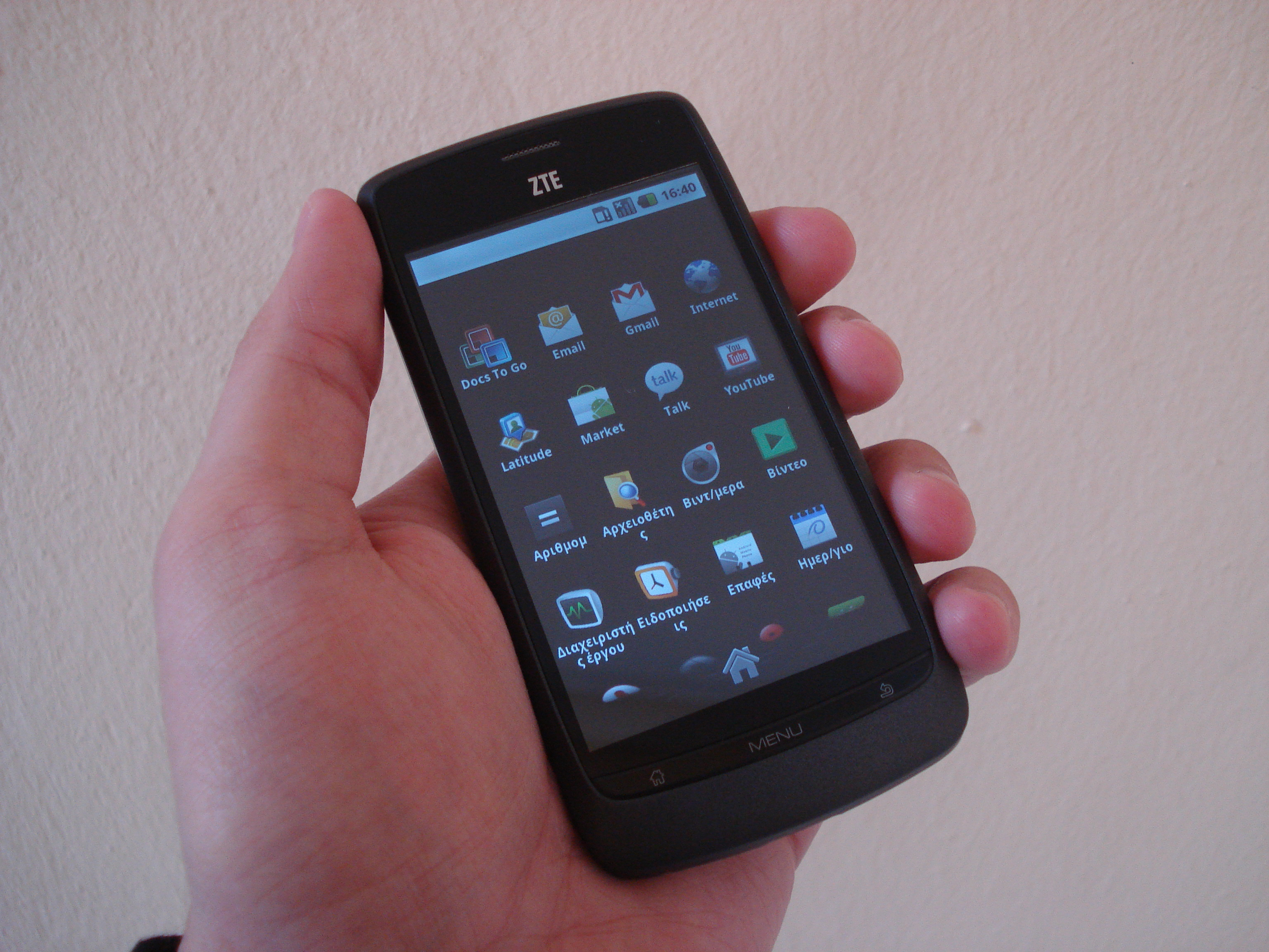 ZTE Blade hands on.